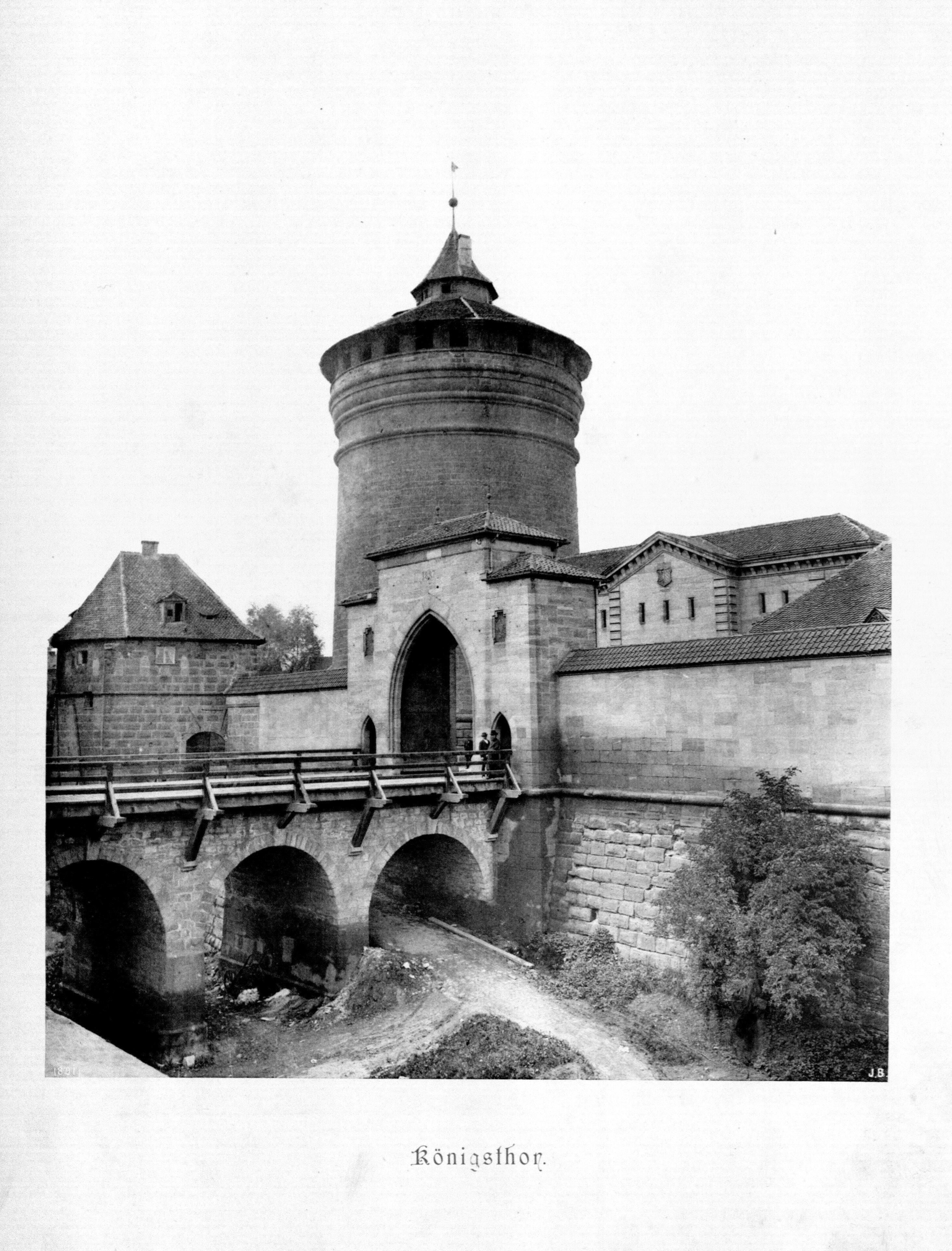 Königsthor. aus dem Band Die Baudenkmäler der Stadt Nürnberg. Erste Nürnberger Lichtdruckanstalt & Kunstverlag Brunner. Nürnberg 1891. 2011 digitalisiert von der Ohm-Hochschulbibliothek Nürnberg. Exemplar mit der Signatur: Nürnberg, Ohm-Hochschulbibliothek -- 901/2.213 / M a